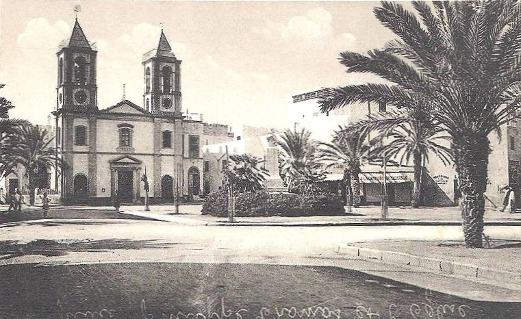 Ancienne Eglise de Sfax en Tunisie dans les années 1910